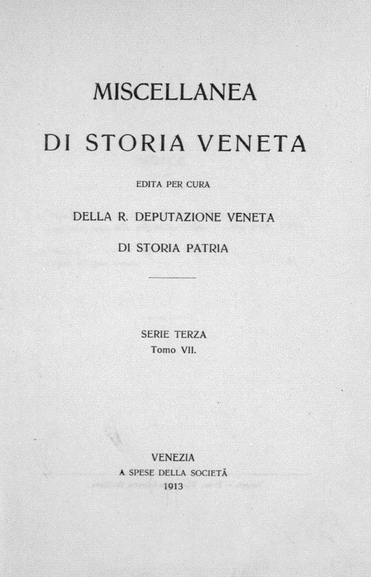 Frontespizio